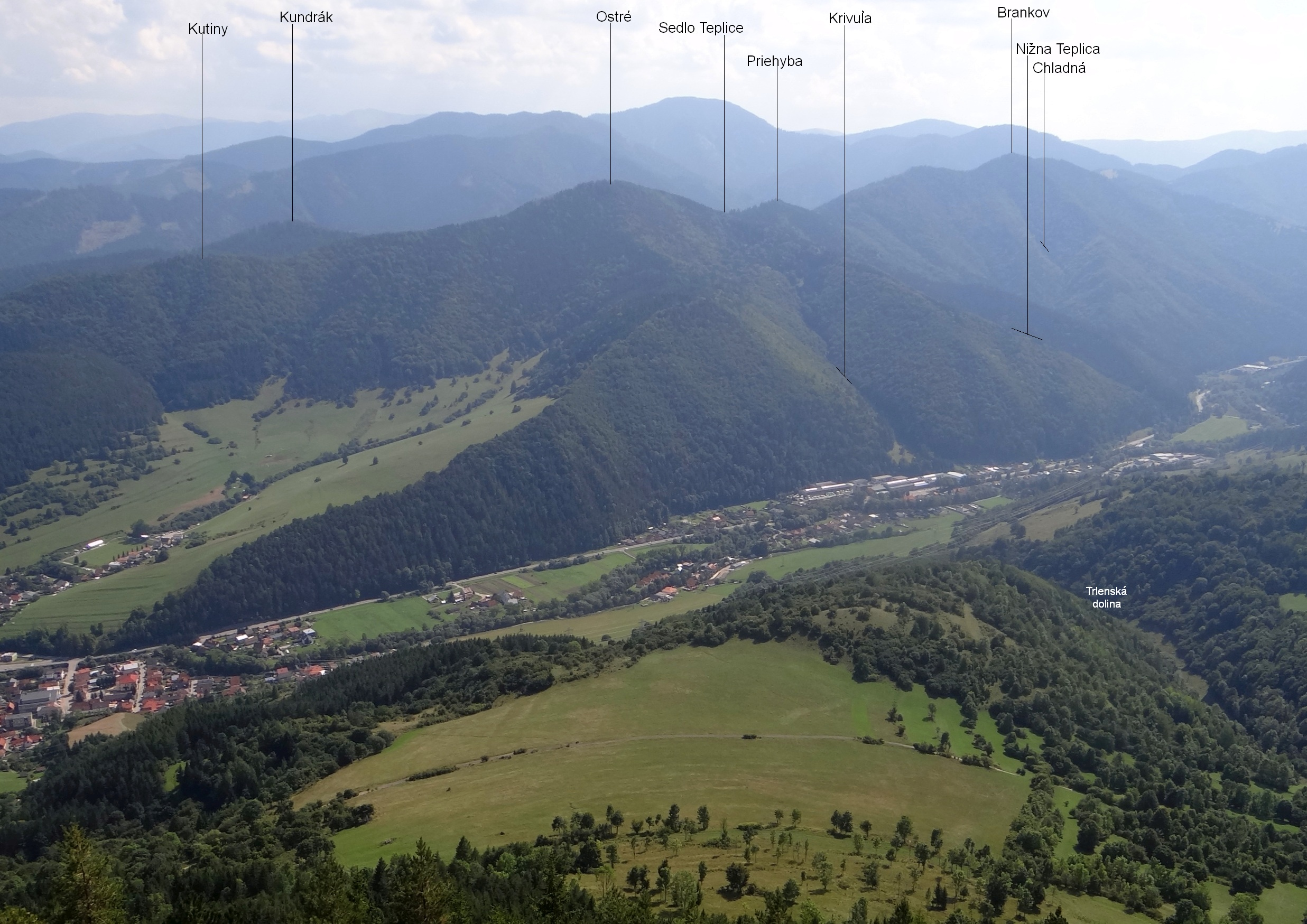 View from Sidorovo